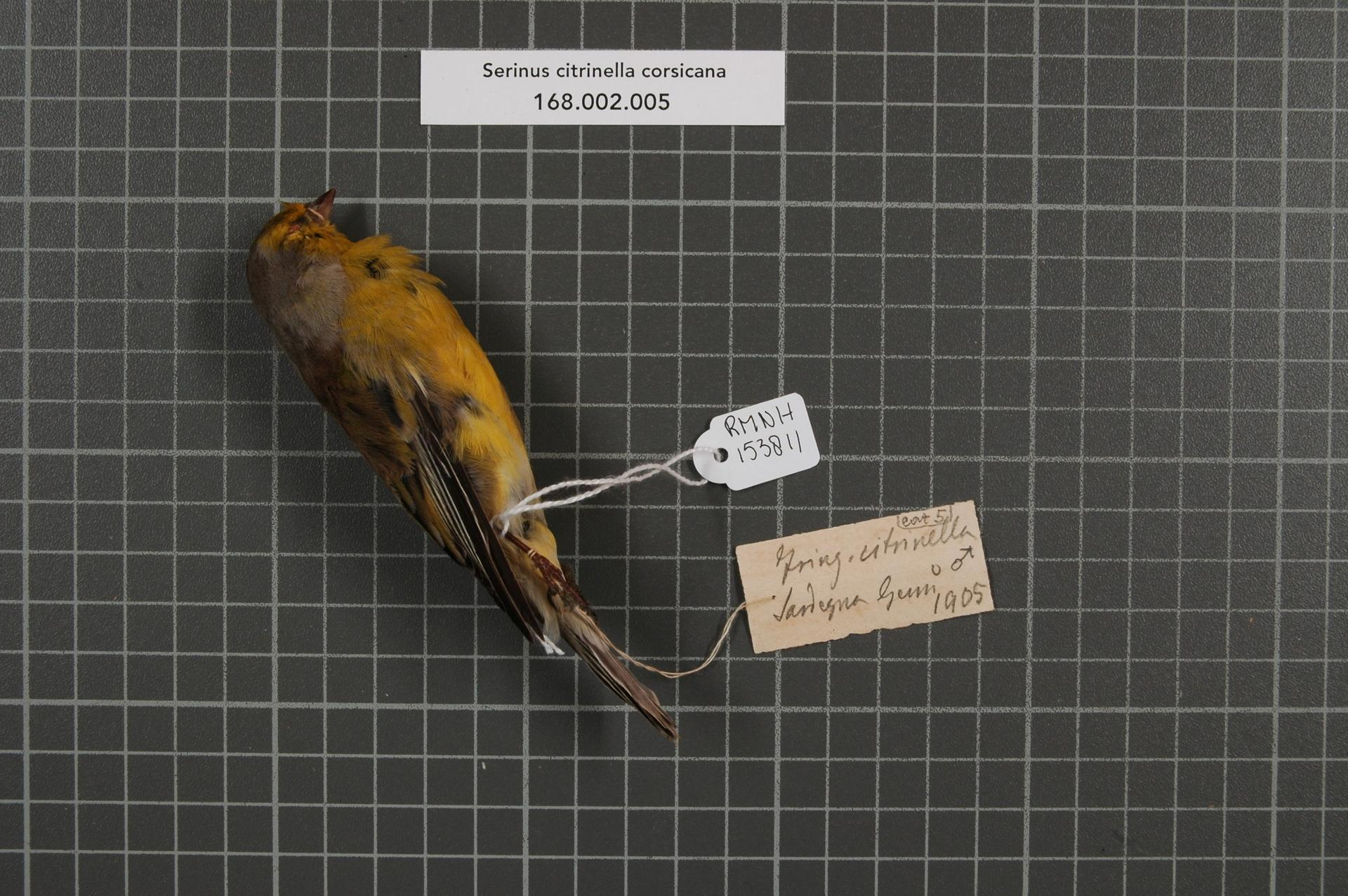 Serinus citrinella corsicana (Koenig, 1899)